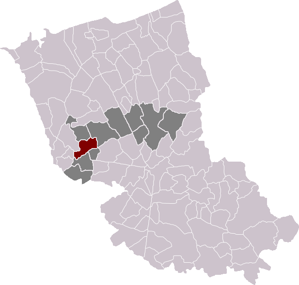 Locatie gemeente Volkerinkhove in arrondissement Duinkerke. Zelfgemaakt. Location of Volckerinckhove municipality in the arrondissement of Dunkirk. Self made. Localisation de la commune de Volckerinckhove dans l'arrondissement de Dunkerque. Fait moi-même.